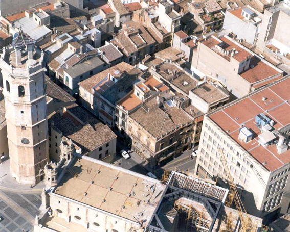 Lonja del Cáñamo (Castellón de la Plana)